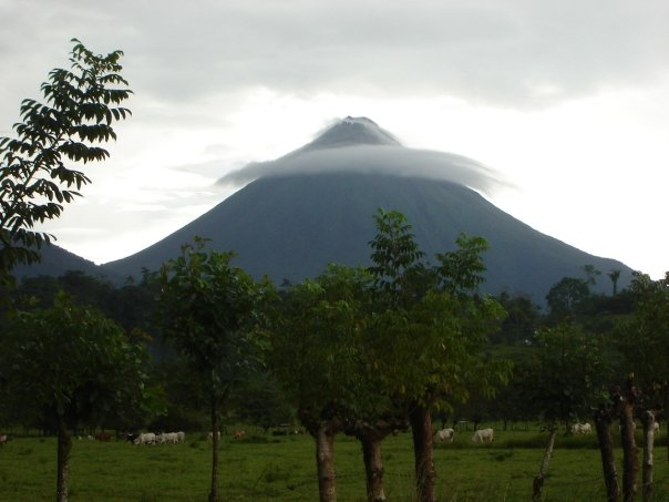 Volcan Arenal, La Fortuna Costa Rica